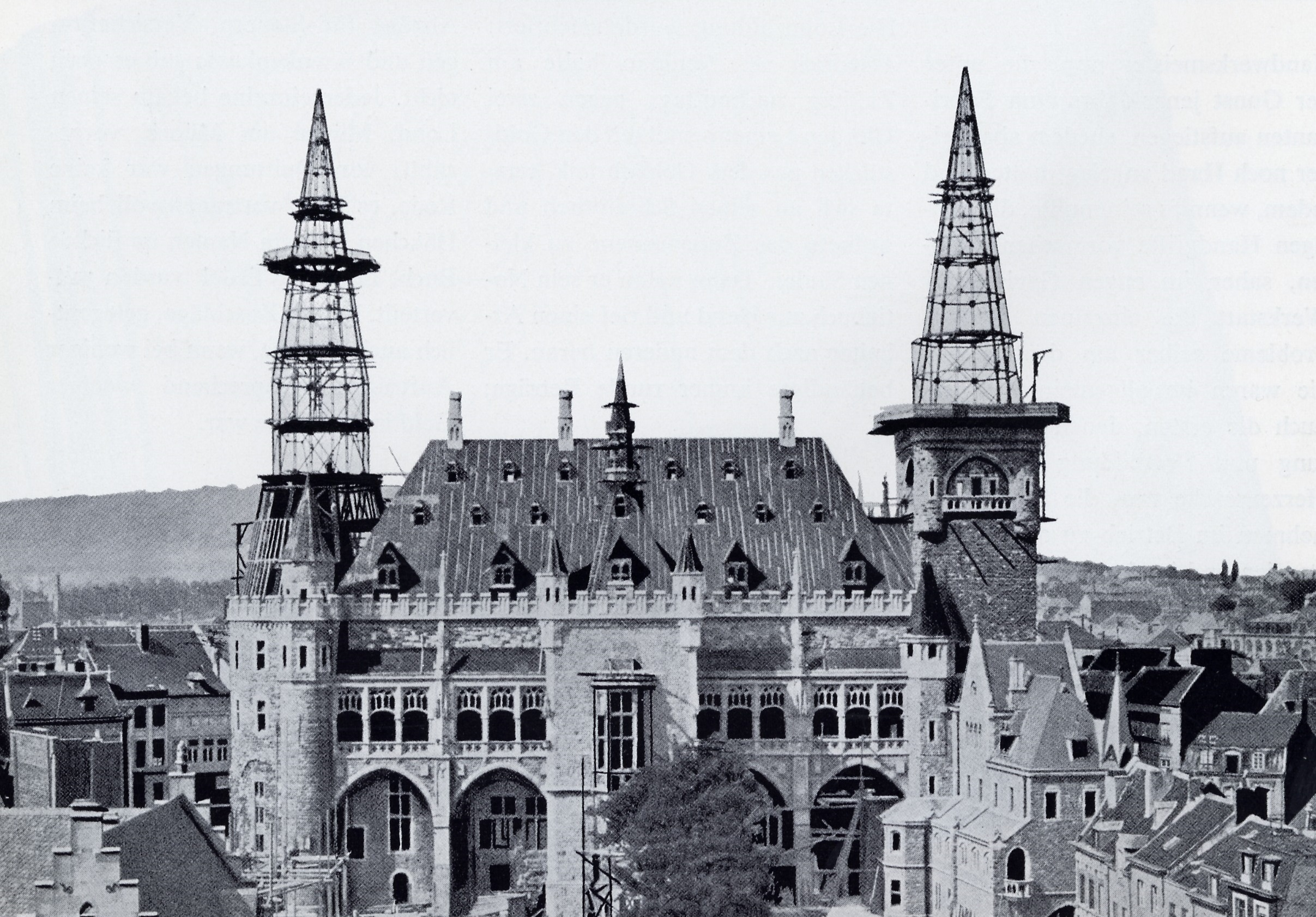 Rathaus Aachen Turmkonstruktion von F.A.Neuman 1899